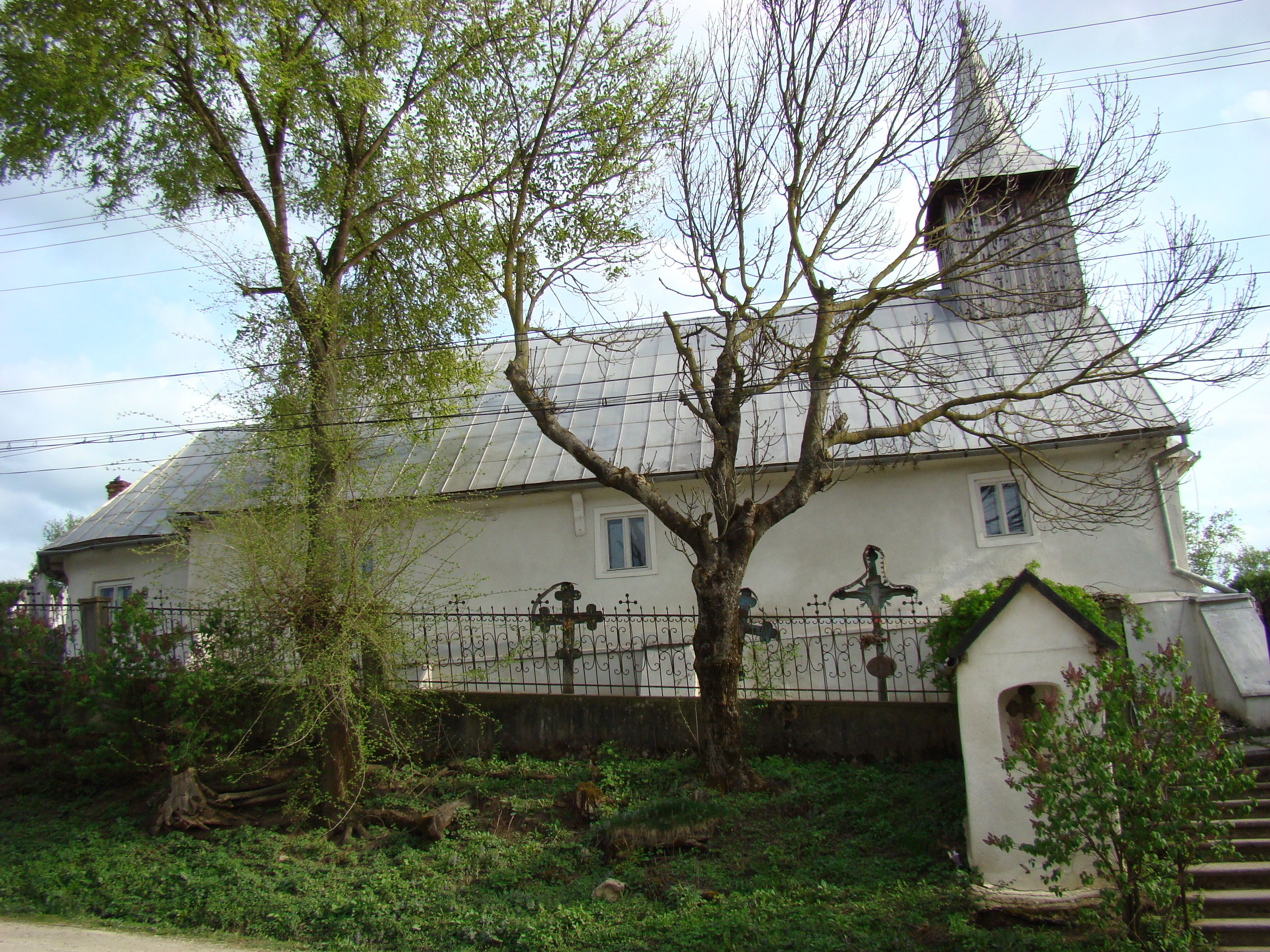 Biserica de lemn din Drâmbar, judeţul Alba.